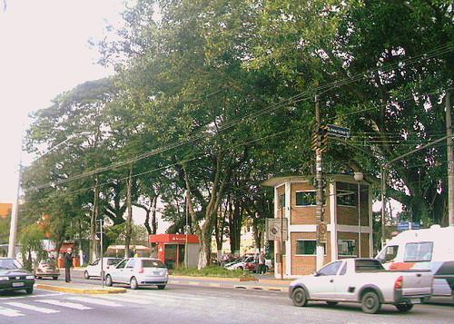 Praça em Brás Cubas